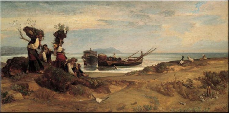 Donne che imbarcano legna ad Anzio